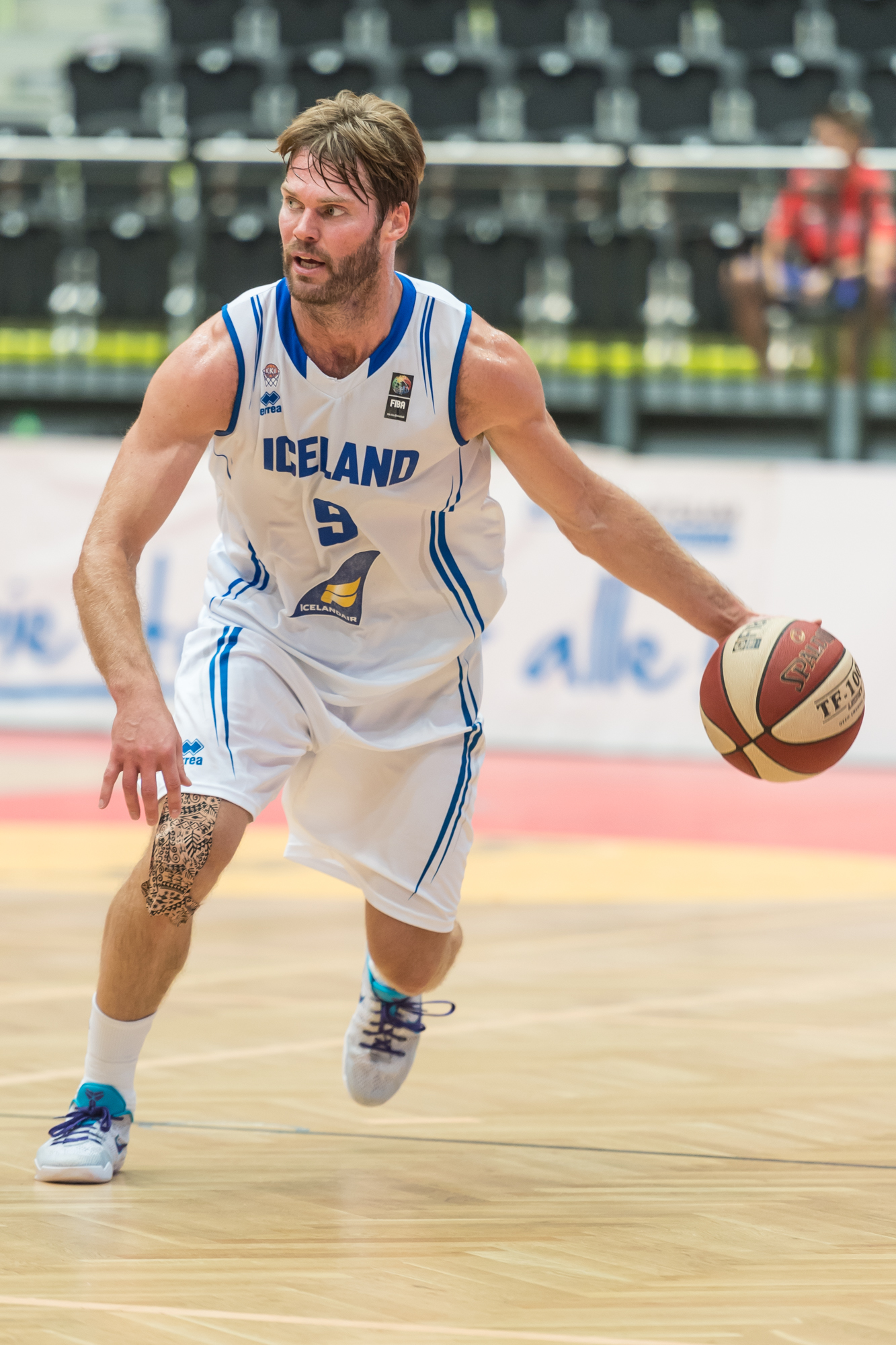 ÖBV Vier-Nationen-Turnier vom 12.-14. August 2016 in Schwechat - Island vs Slowenien. Bild zeigt Jon Arnor Stefansson (ISL).